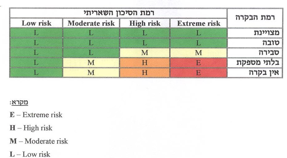 השפעת הבקרה על דירוג הסיכון